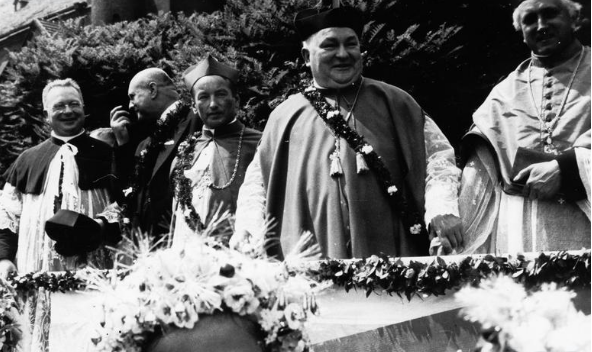 Od prawej: ks. Emil Szramek, ks. Paweł Brandys, bp Teofil Bromboszcz, Karol Grzesik i ks. Jan Brandys w czasie jubileuszu 40 - lecia kapłaństwa ks. prałata Pawła Brandysa.